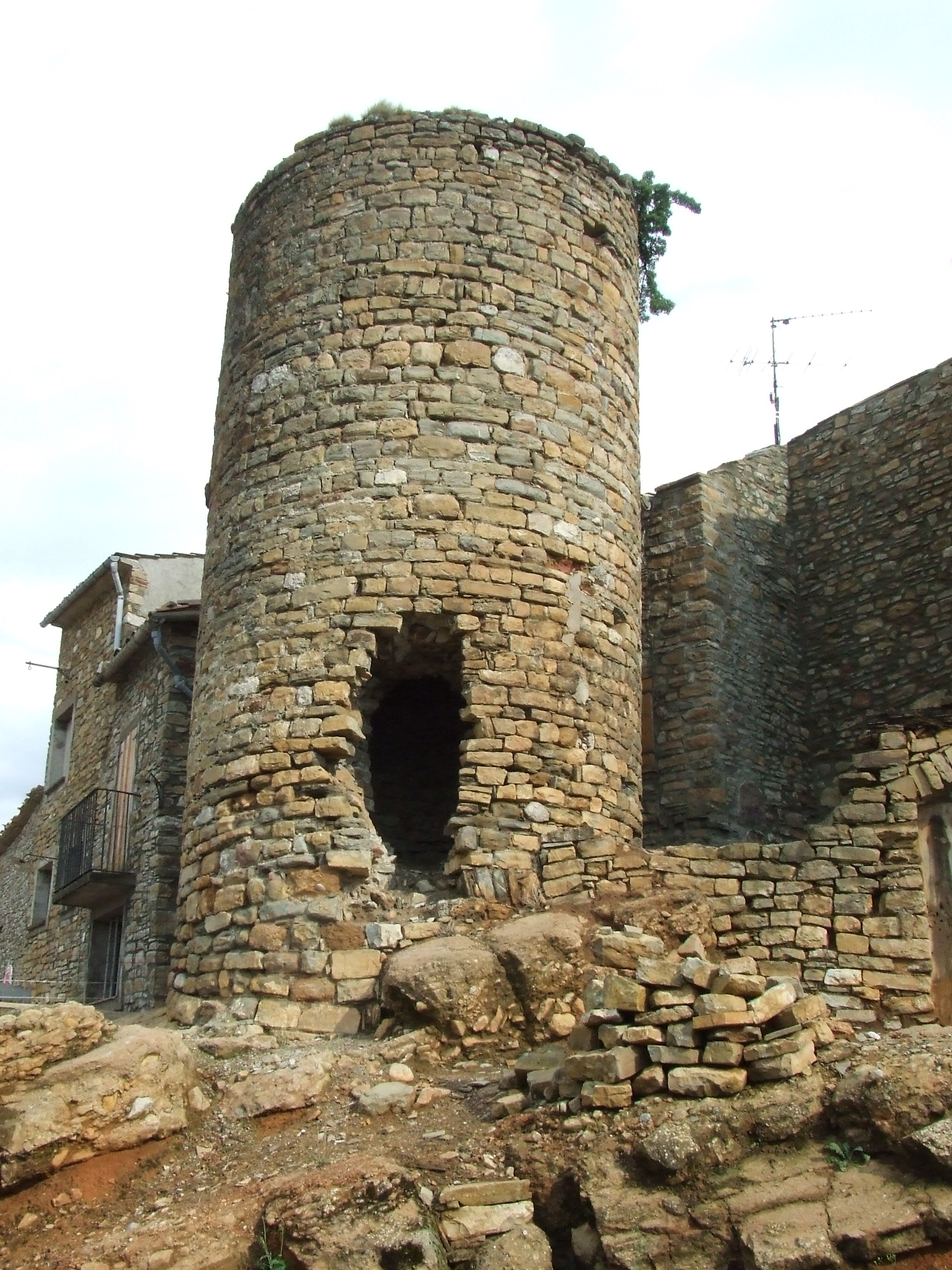 La Torre de Claverol (Conca de Dalt, Pallars Jussà)